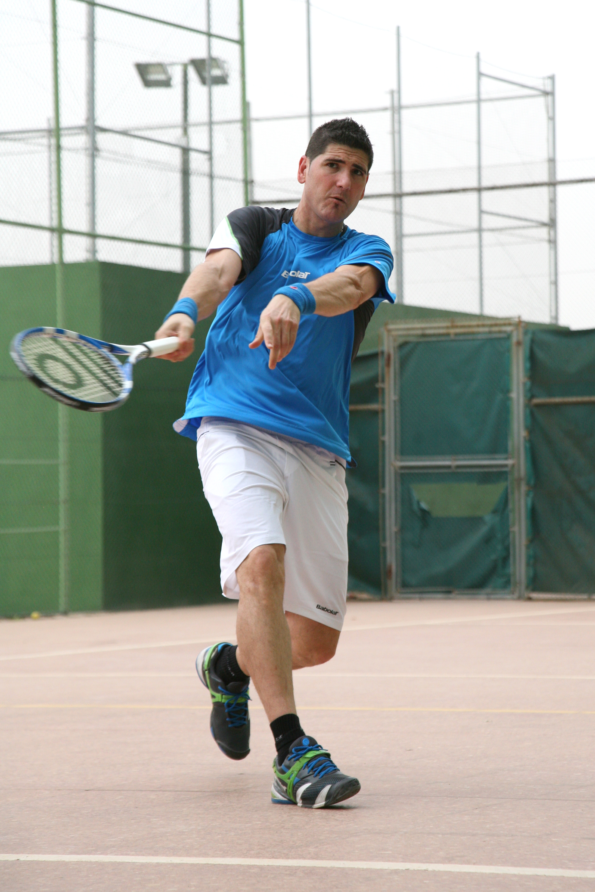 reves